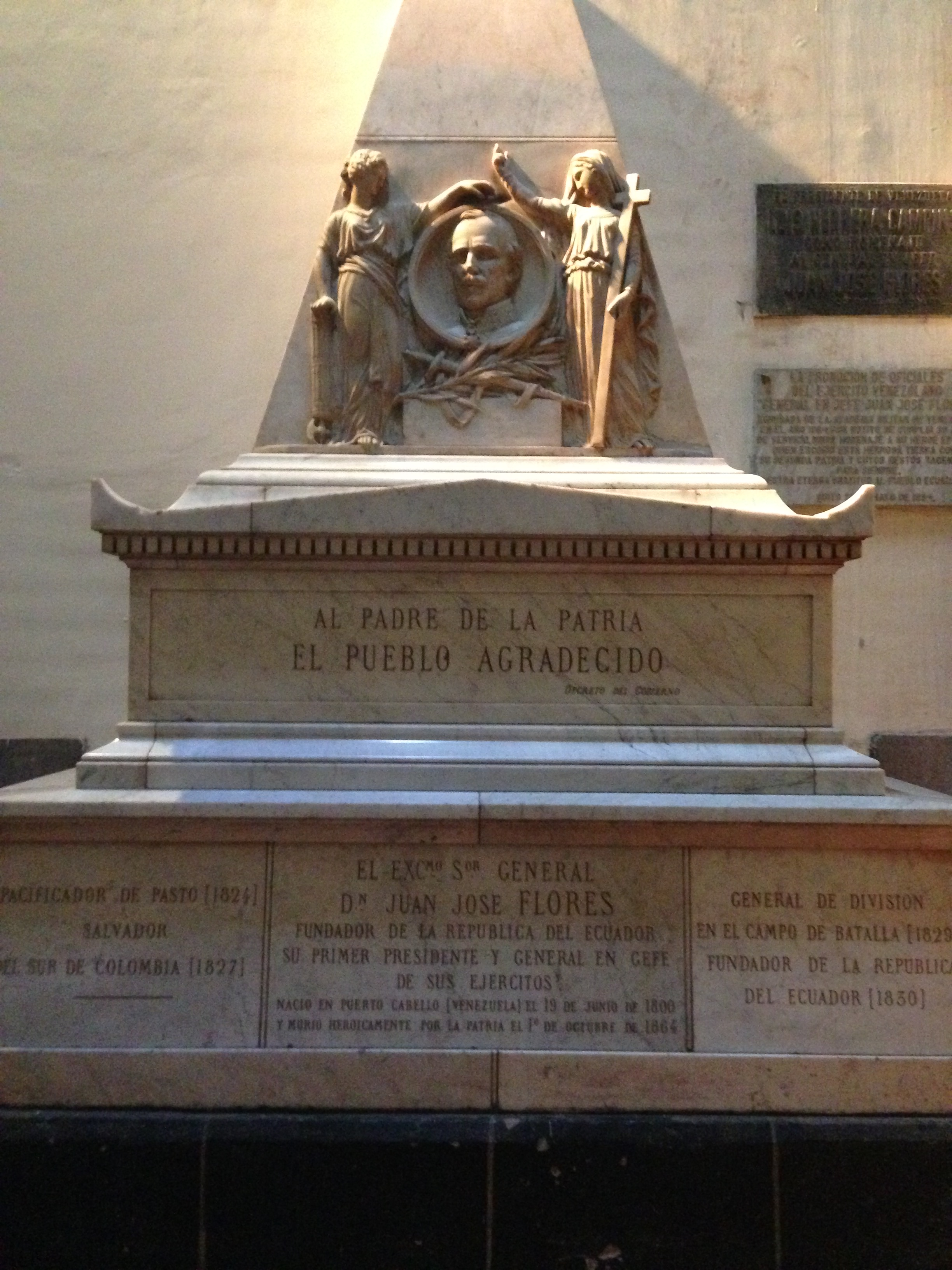 Tumba donde descansa el General Juan José Flores en la Catedral Metropolitana de Quito